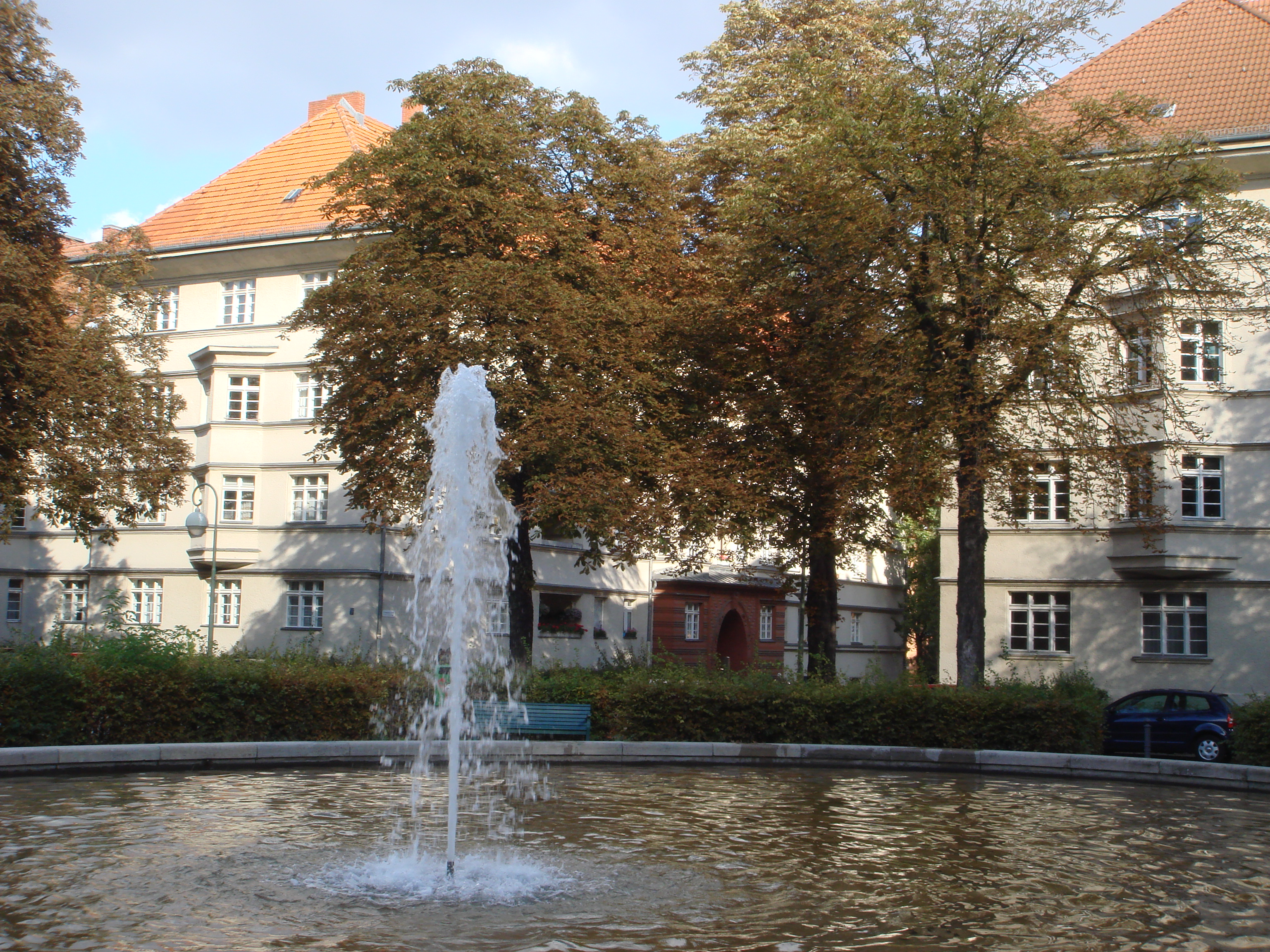 Fontäne in den Ceciliengärten